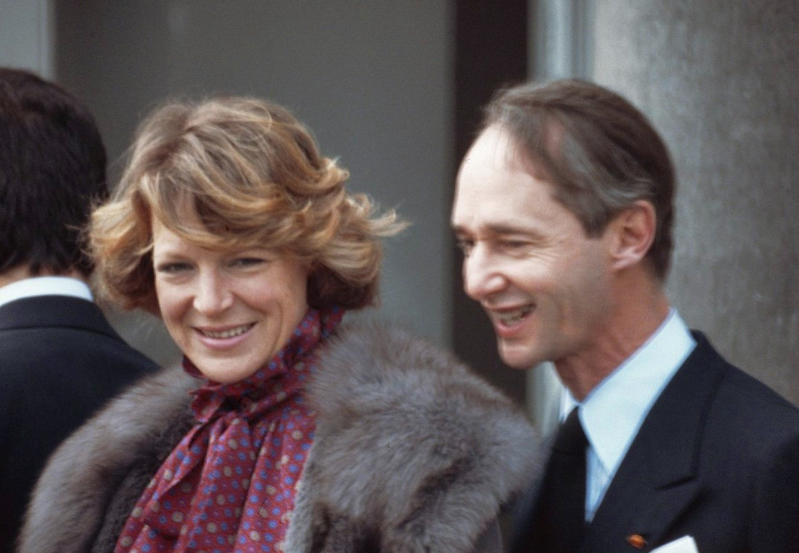 Koninginnedag 1978, defile Soestdijk; Prinses Irene en Prins Charles Hugo (koppen)